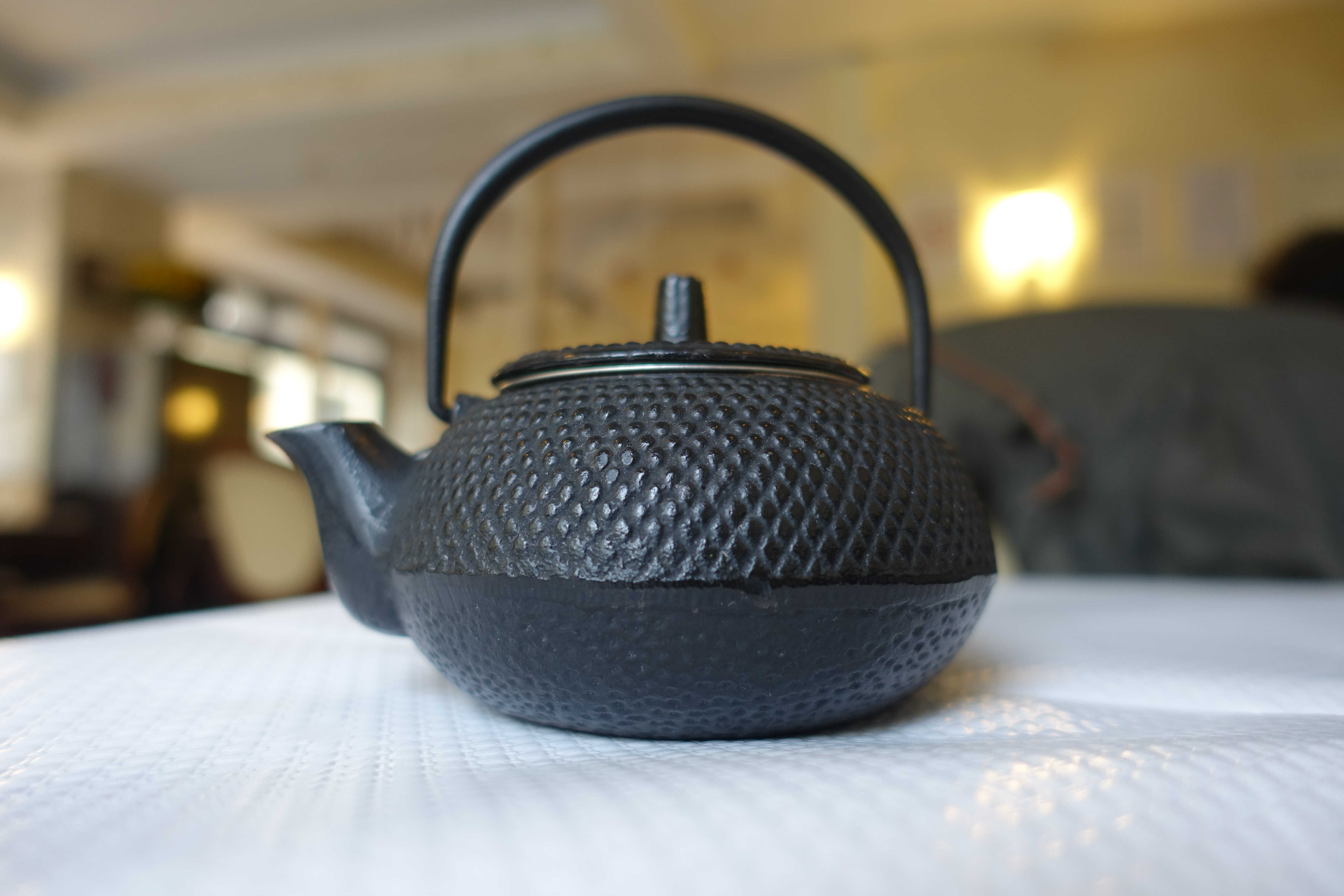 Teapot @ Kohyang @ Paris